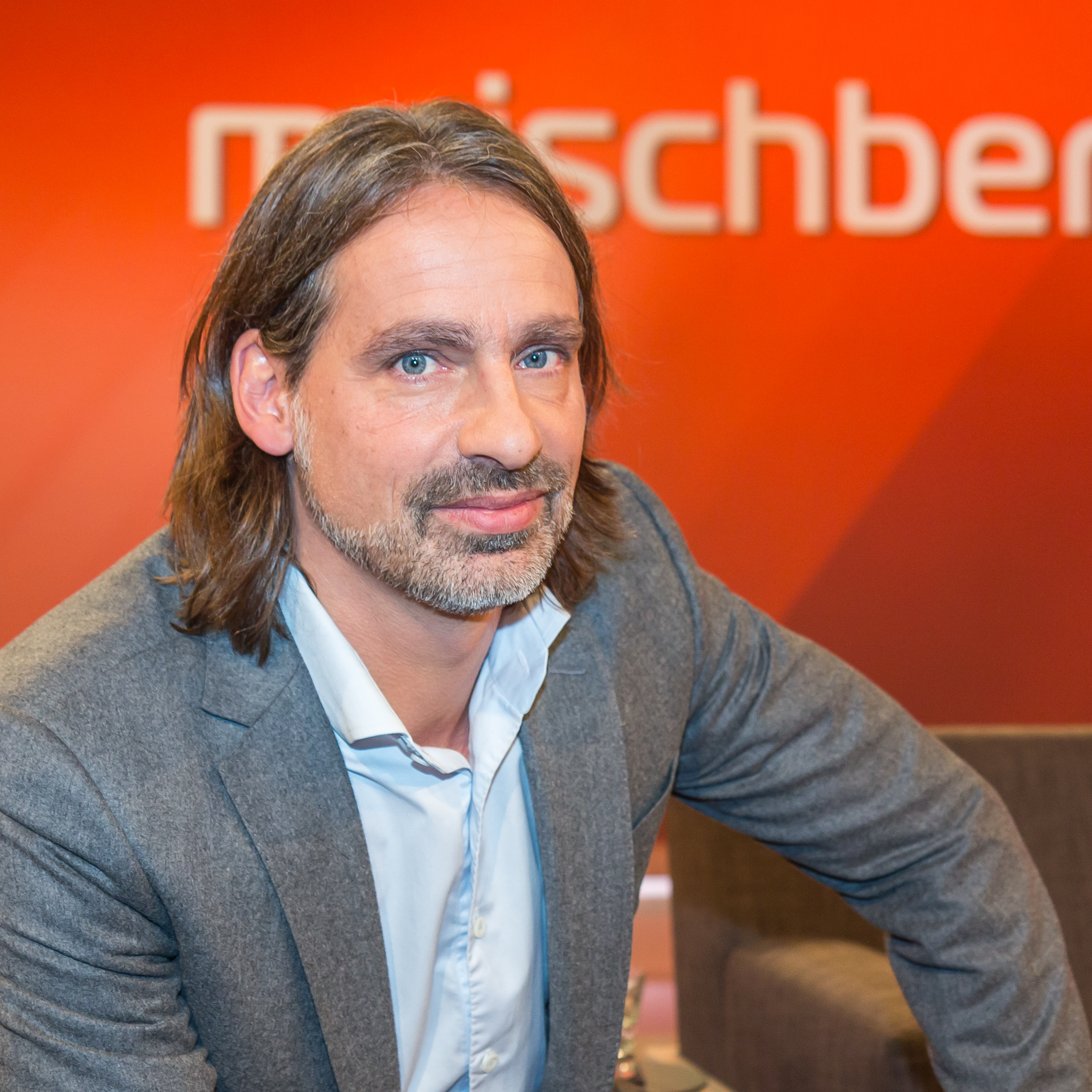 Maischberger, Sendung vom 14. Dezember 2016. Produziert vom WDR. Thema der Sendung: „Wutbürger gegen Gutmenschen: Verliert die Demokratie?“ Foto: Richard David Precht (Philosoph und Autor)